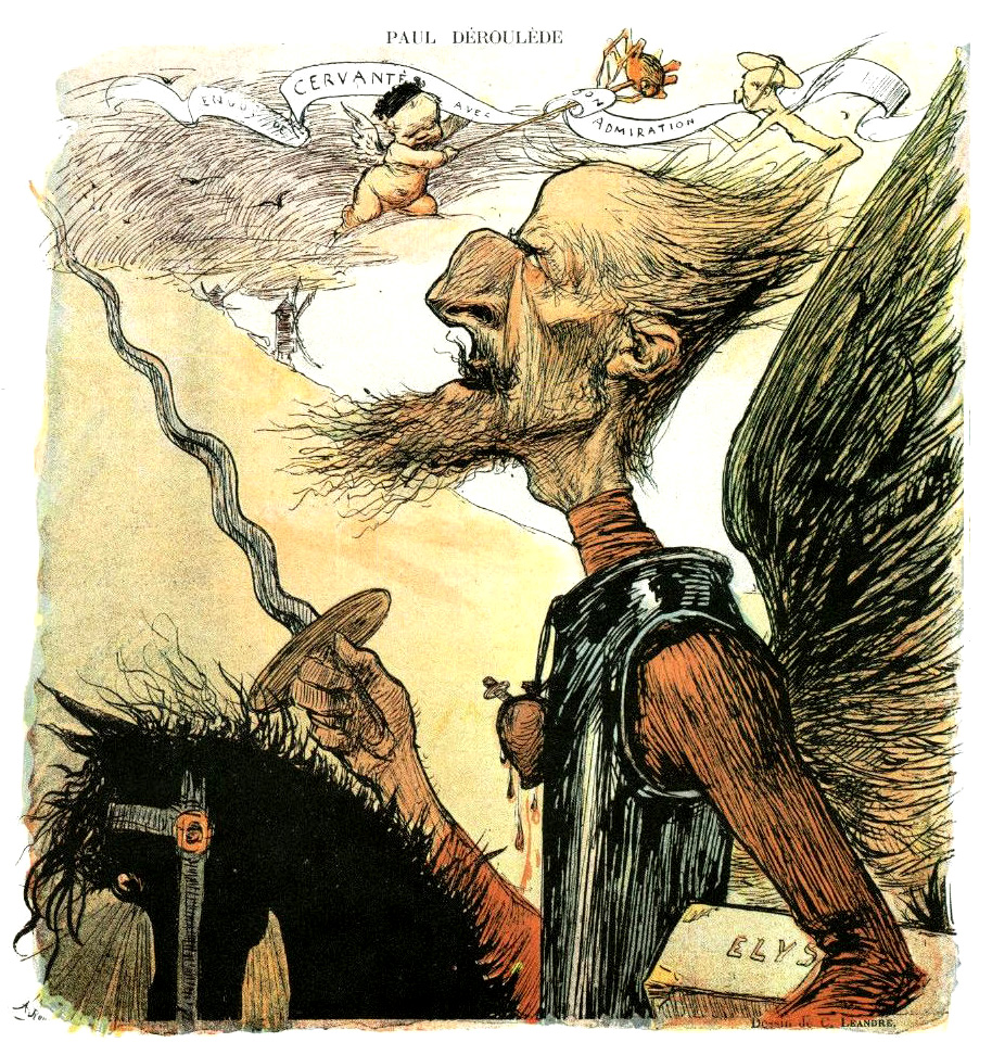 Caricature de Paul Déroulède en Don Quichotte, par Charles Léandre (revue Le Rire, n° 232, 15 avril 1899).